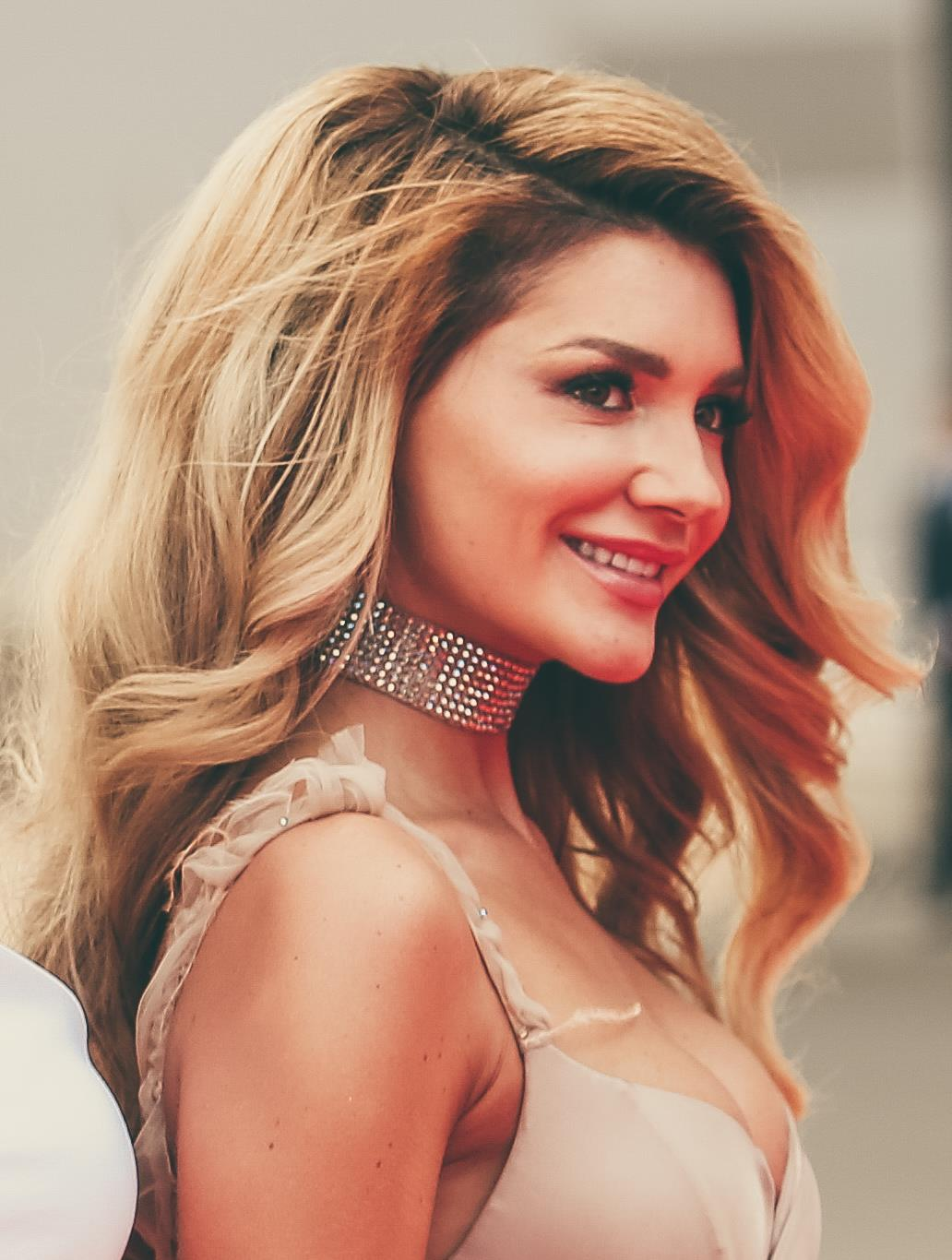 Миша Романова на премии телеканала «RU.TV 2016» в Москве